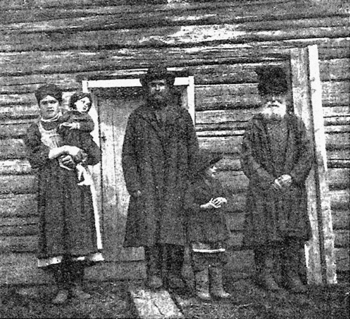 Бухтарминские старообрядцы. Традиционная одежда. Источник: Бухтарминские старообрядцы. Материалы комиссии экспедиционных исследований. Серия Казахстанская. Вып. 17. Л., 1930.